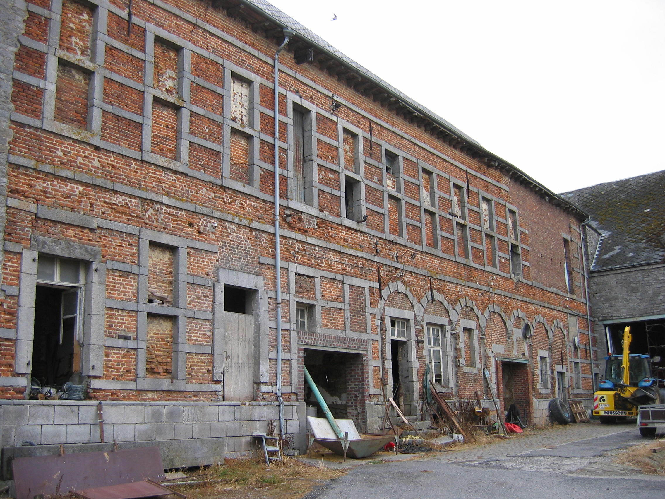 Château-ferme de Foisches : vue de la cour intérieure